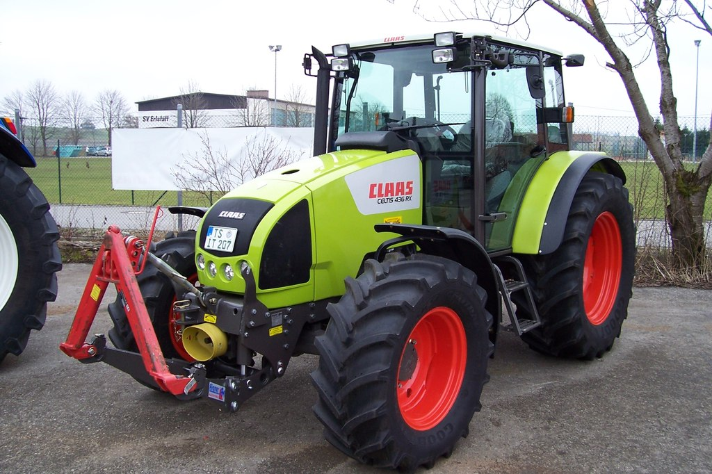 Claas Celtis 436 RX mit rotem Schnellkuppeldreieck am Fronthubwerk, Deutschland